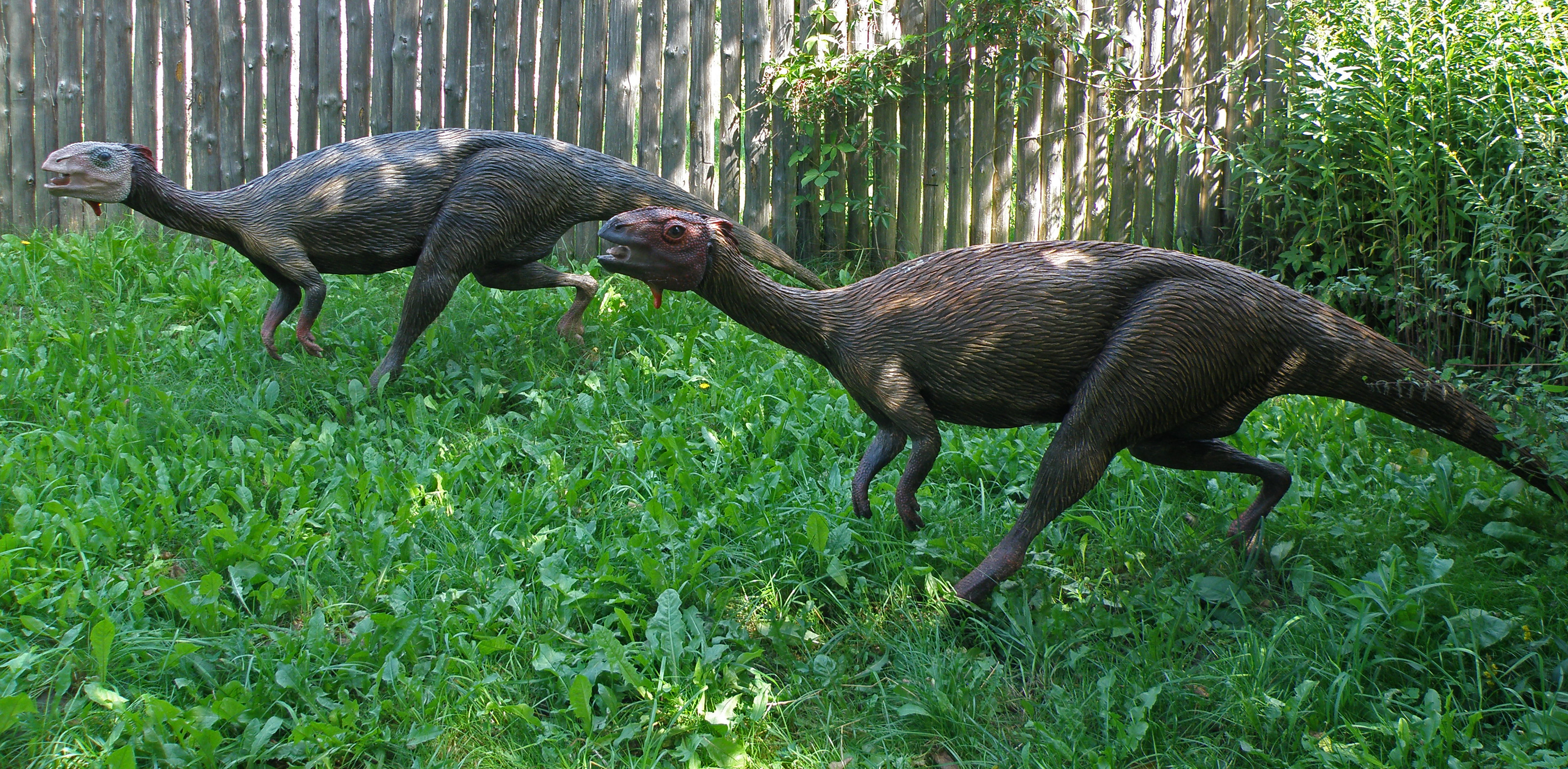 JuraPark Bałtów - Park Dinozaurów - Driozaur (Dryosaurus)